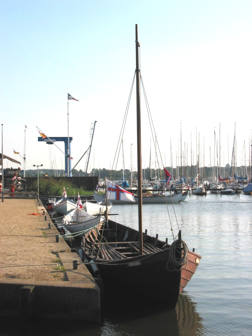 Færøbåden Naddoddur i Slesvig, Tyskland august 2004